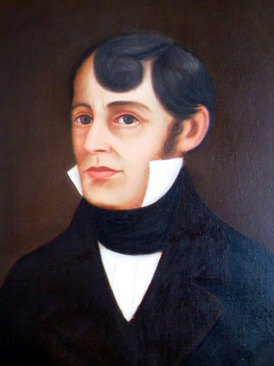 Juan Mora Fernández, Jefe de Estado de Costa Rica de 1825-1829 y 1829-1833.